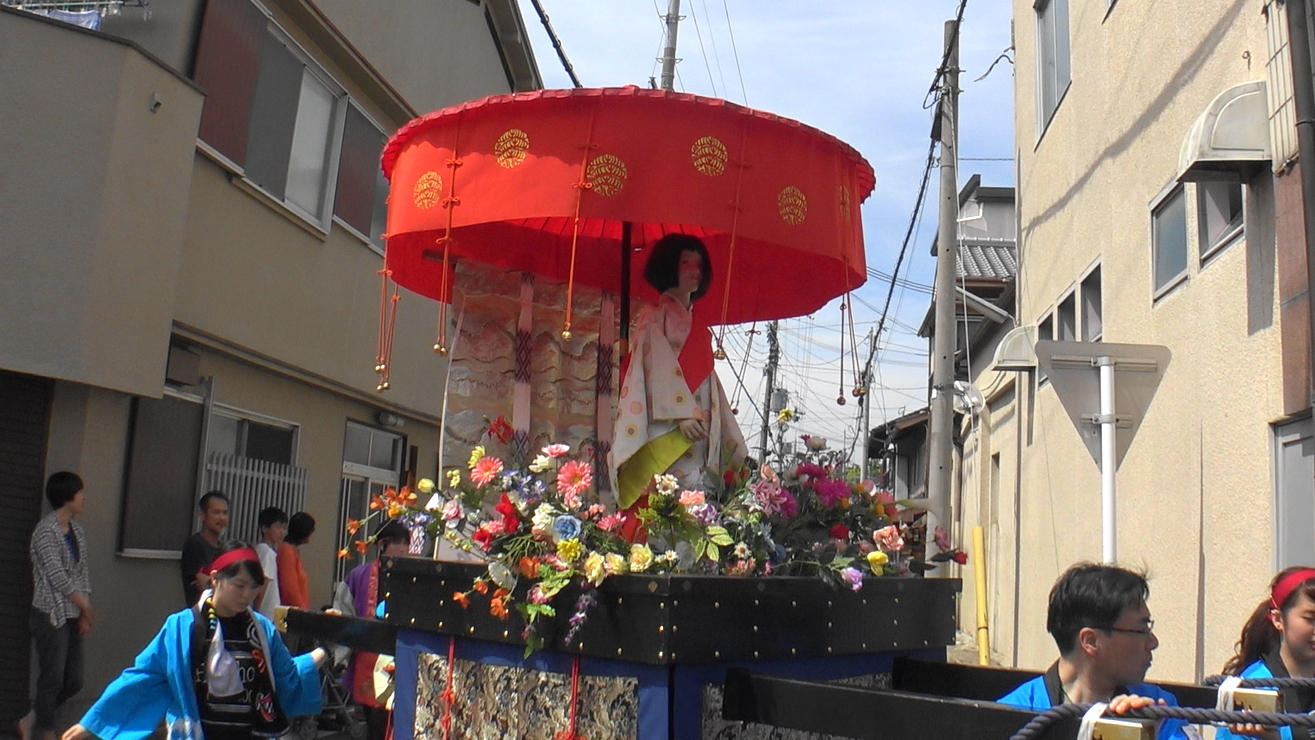 京都市の今宮神社でおこなわれる今宮祭での玉の輿